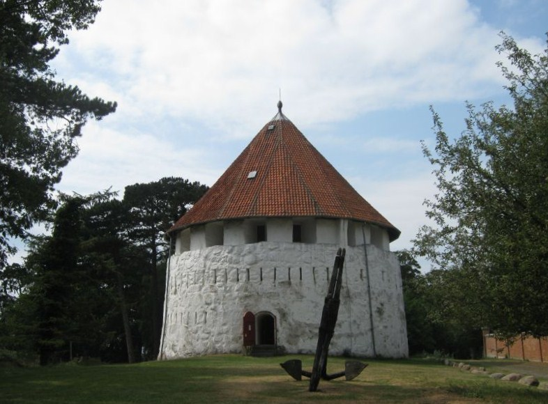 Kastell und Verteidigungsmuseum in Rønne, Bornholm